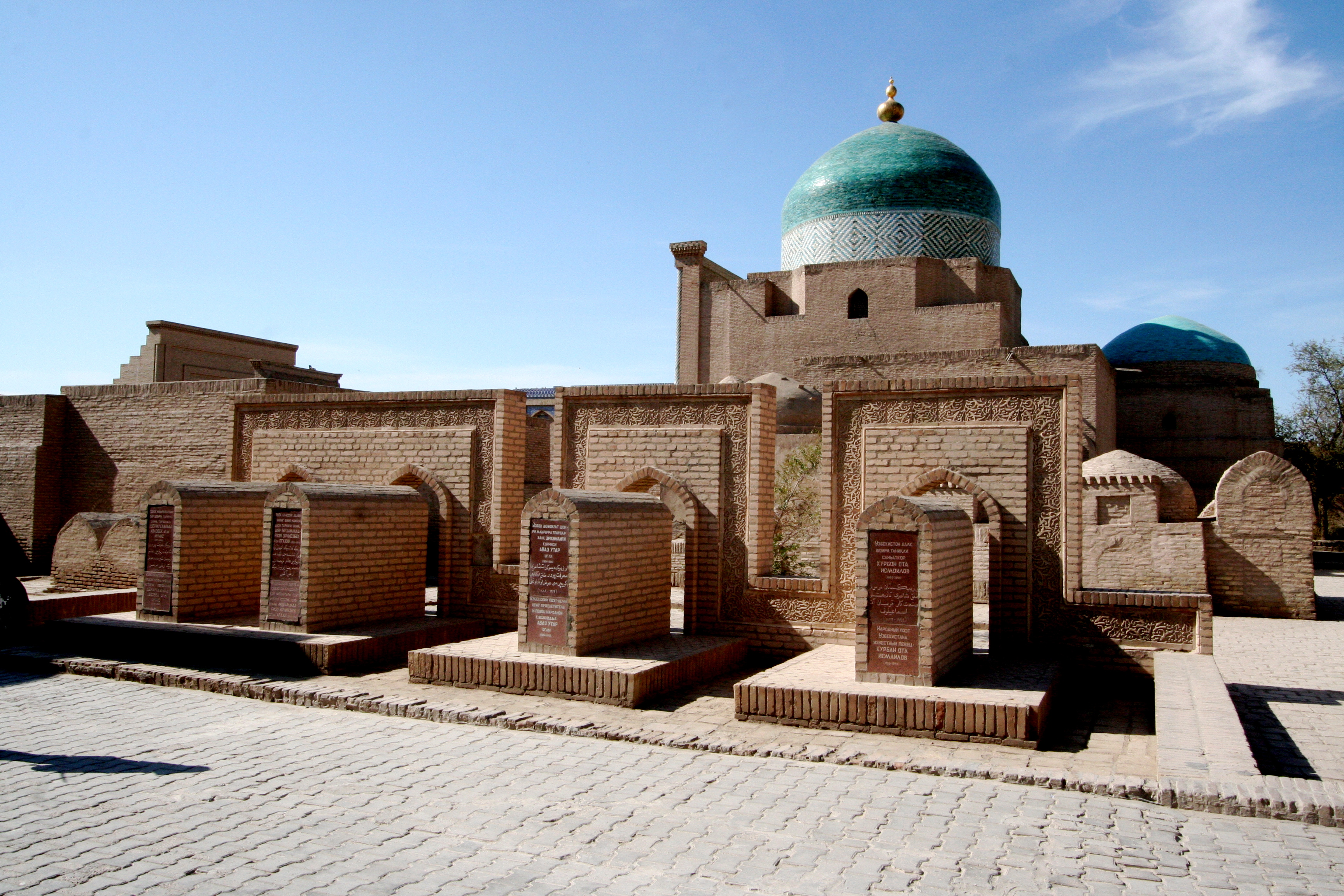 Pakhlavan Makhmood mausoleum. Pahlavan Mahmud Maqbarasi. Pakhlavan Makhmud mausoleum Khiva, Itchan Kala, Uzbekistán. Patrimonio de la Humanidad Khorezm region, Khiva, Uzbekistan. World Heritage